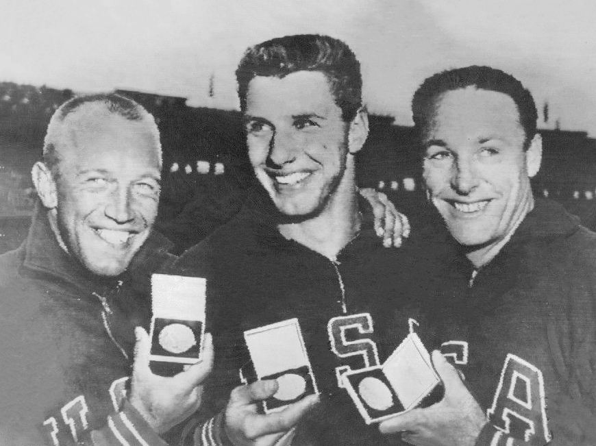 1956 Melbourne US Des Koch Al Oerter & Fortune Gordien Swept Discus Press Photo